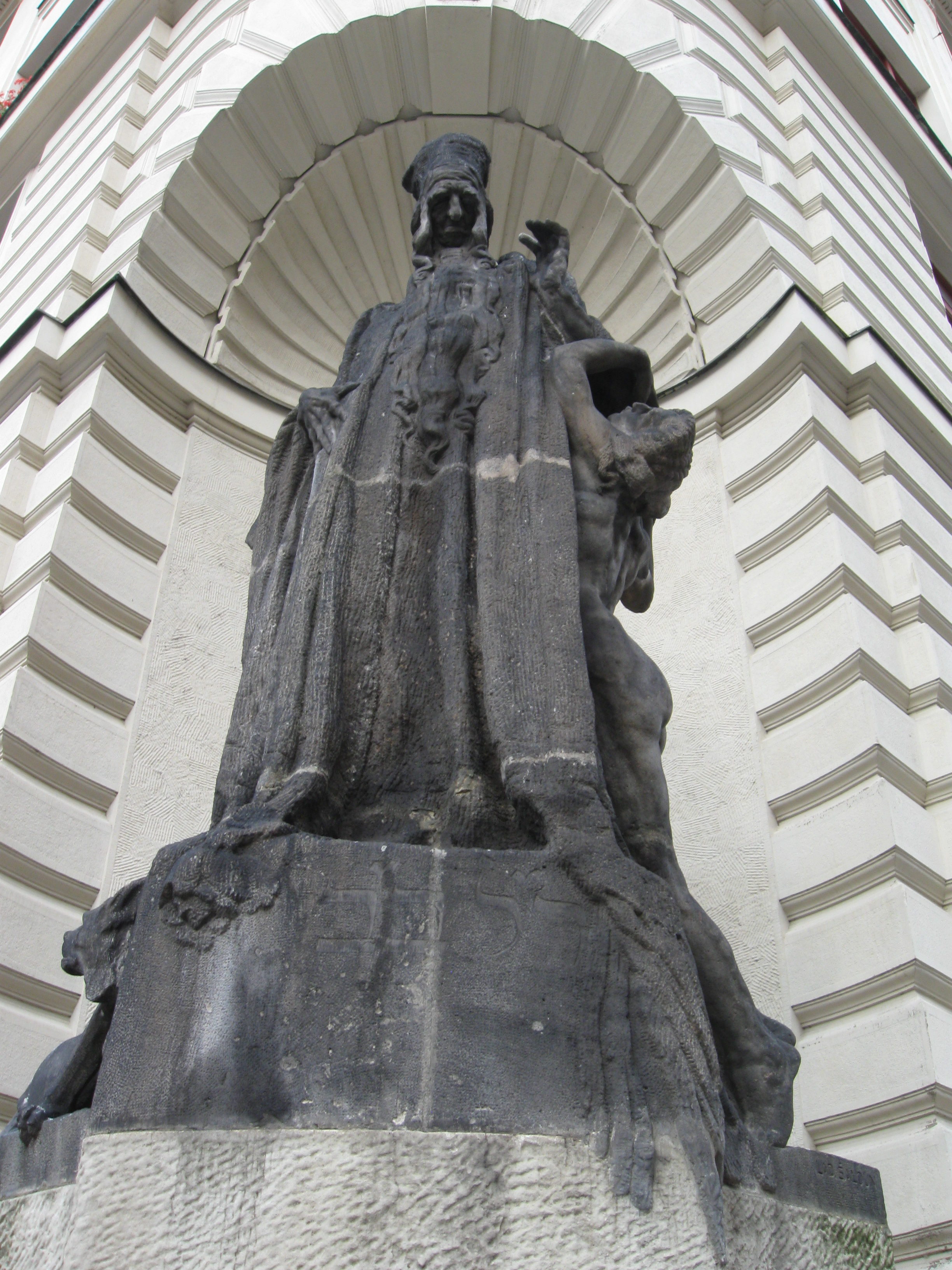 Radnice nová (Staré Město), Praha 1, Mariánské nám. 2, Staré Město